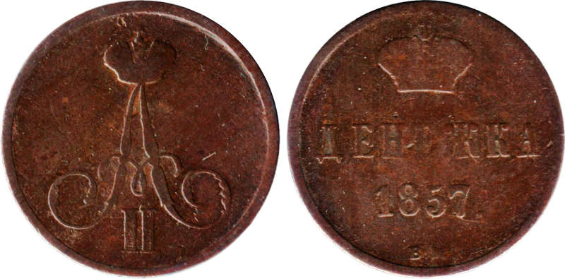 Dieniezka 1857 BM